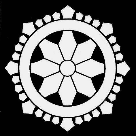 輪宝紋